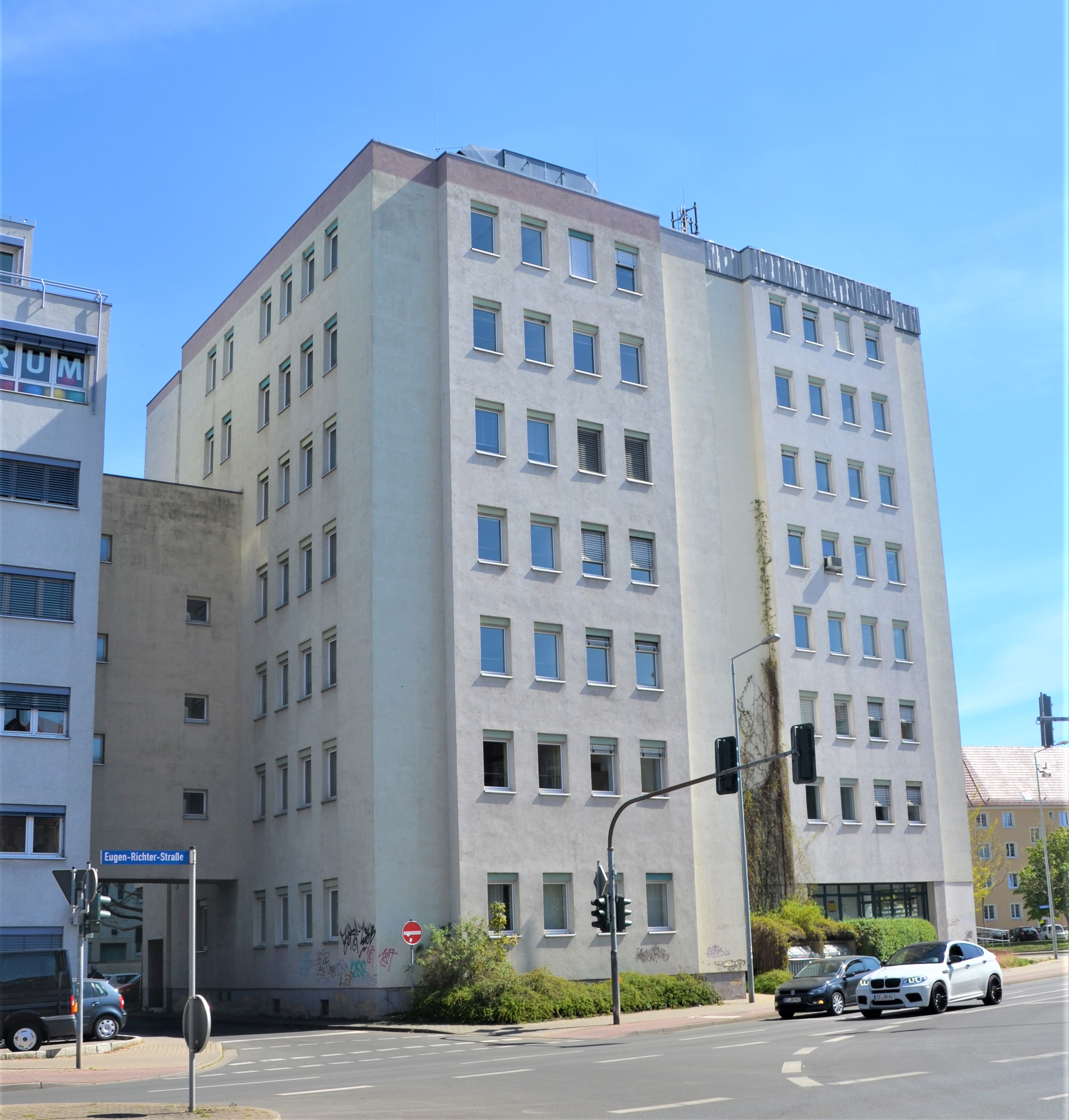 Max-Weber-Kolleg am Steinplatz von Erfurt von Norden, früher Fachhochschule Erfurt